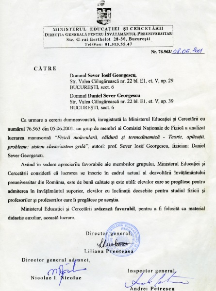 Aviz emis de Ministerul Educației și Cercetării privind manualul Fizică Moleculară. (Teorie, aplicații, probleme-sistem clasic, sistem grilă-extensii, lucrări de laborator).